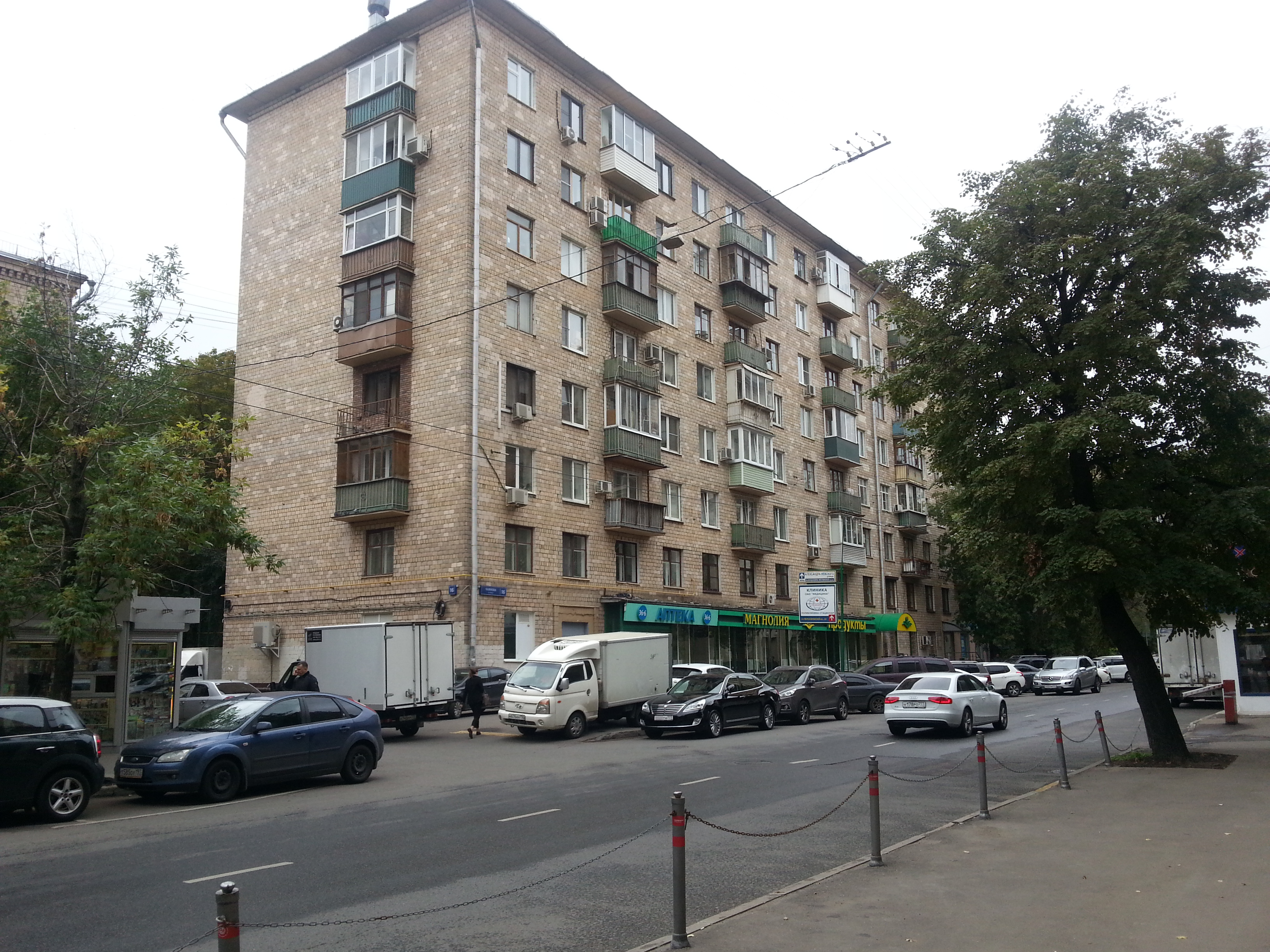 Улица Чаянова, д. 16. 14 сентября 2016г.